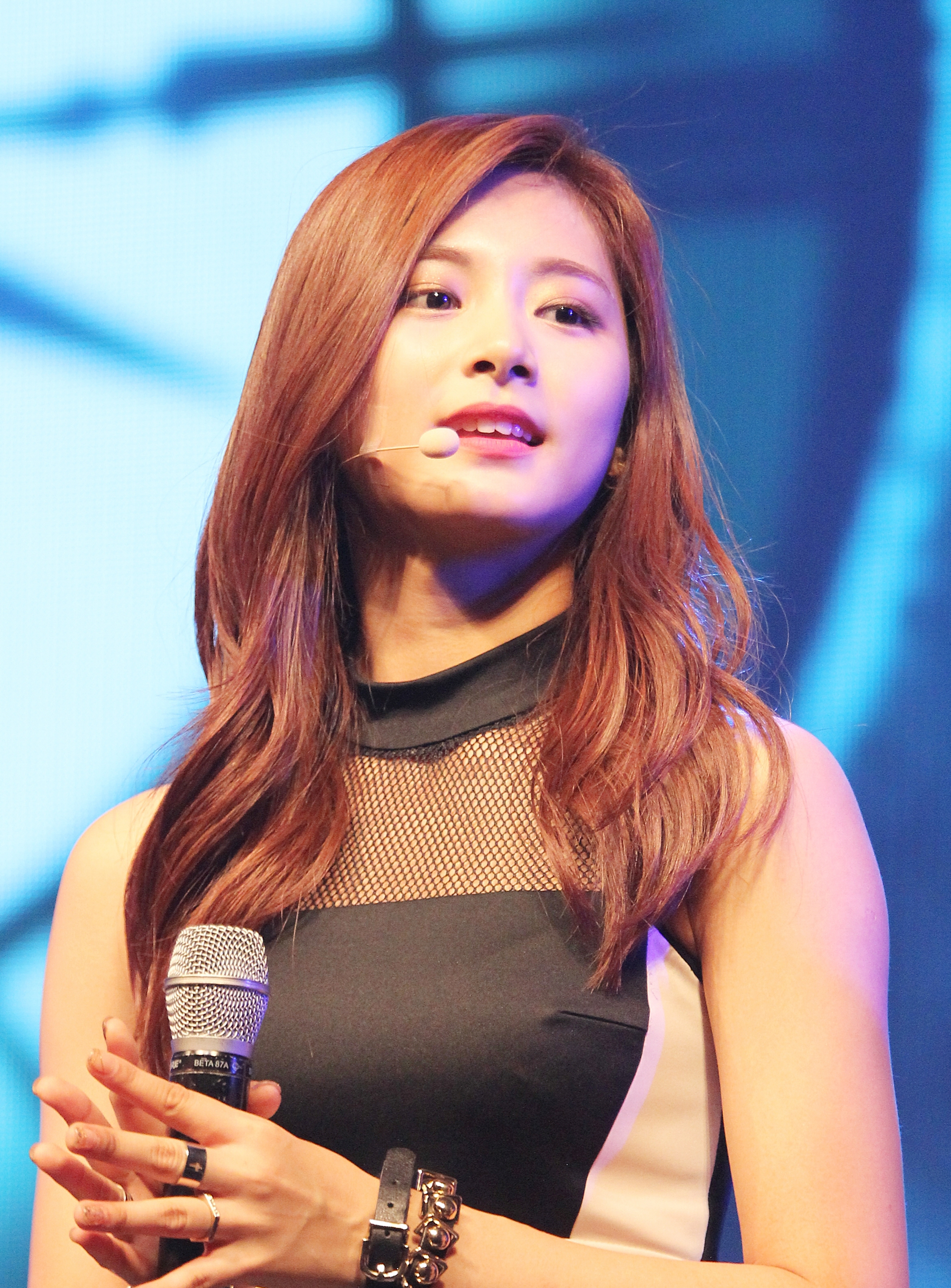 151020 트와이스 - 데뷔 쇼케이스 TWICE - Debut Showcase